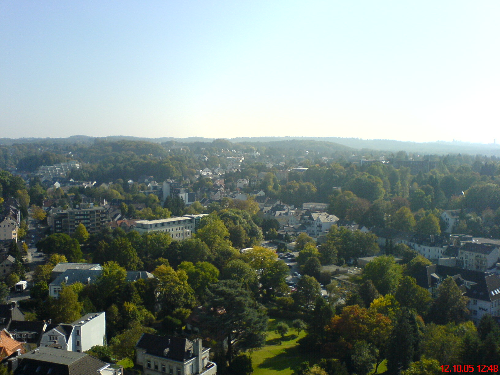 Ein Ausblick über Bergisch Gladbach in Richtung Bergisch Gladbach-Herkenrath (Norden), aufgenommen am 12.10.2005 aus dem Marienkrankenhaus Bergisch Gladbach (katholisches Krankenhaus im Stadtzentrum). - A view over Bergisch Gladbach to Bergisch Gladbach-Herkenrath (north), picture taken on 2005-10-12 from Marienkrankenhaus Bergisch Gladbach (catholic hospital in city center).